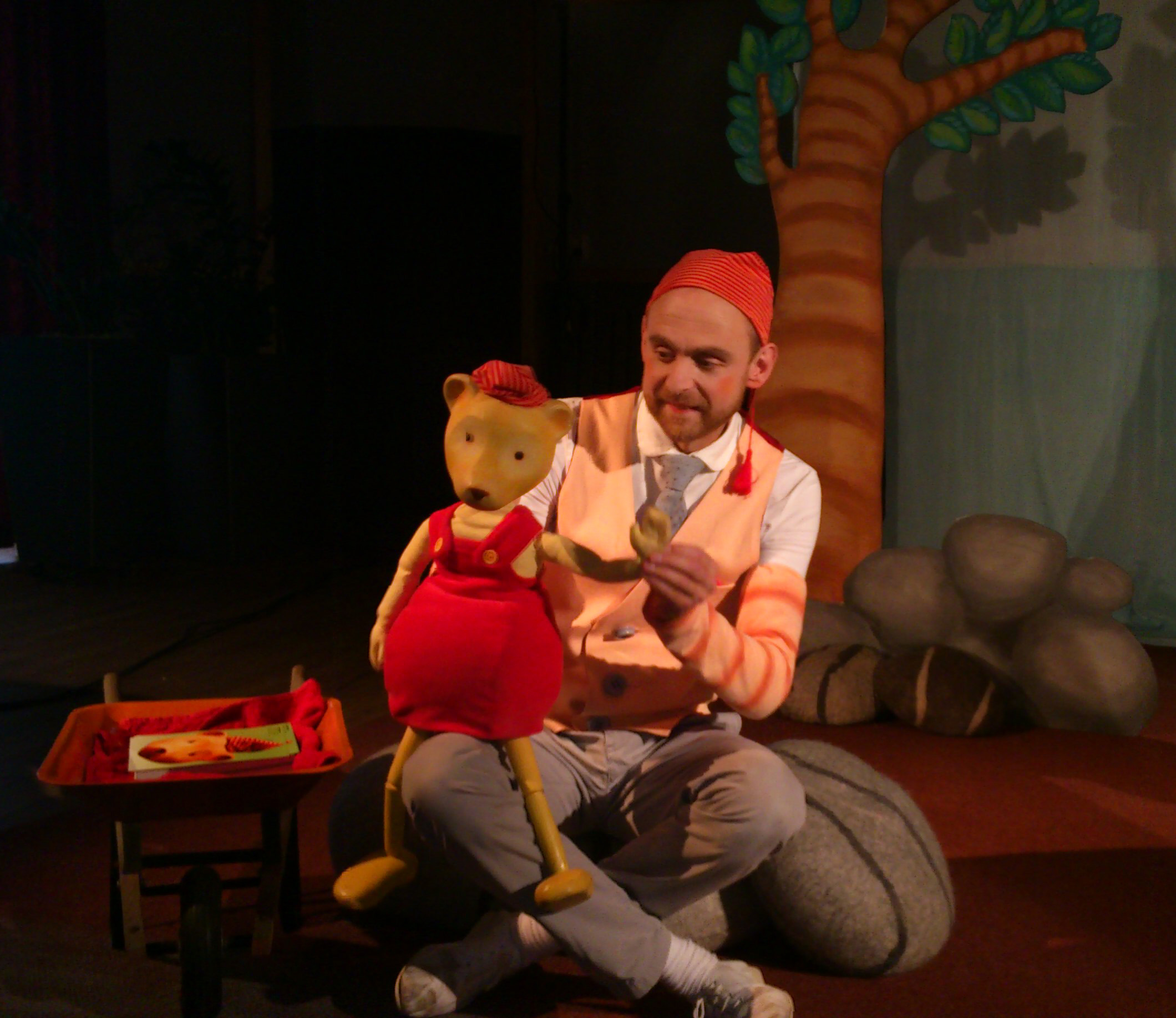 "Nasse-Musikalen" av Dockteatern Tittut, fritt efter boken "Nasse hittar en stol" av Sven Nordqvist. Dockspelare Martin Hasselgren (med Nasse-docka) och Annika From Borg (ej i bild). 5 nov 2014, Kulturhuset Fregatten, Stenungsund